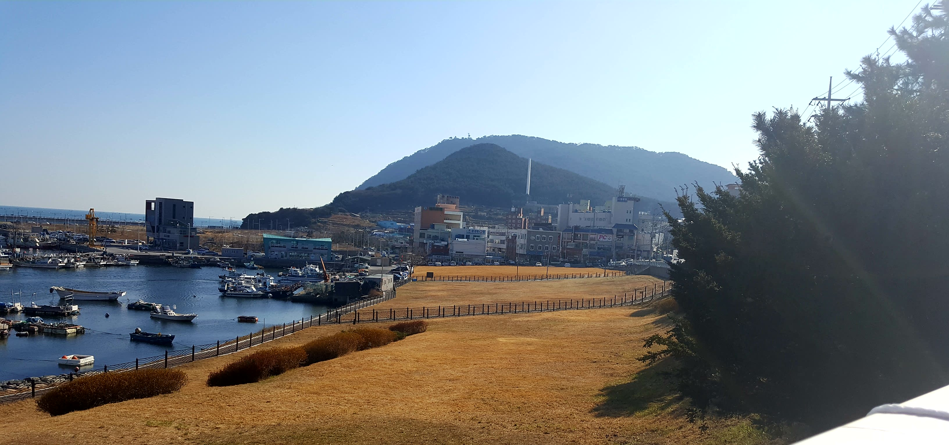 부산시 동삼동 패총